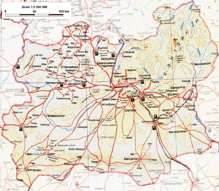 Монгол: Төв аймгийн газрын зураг